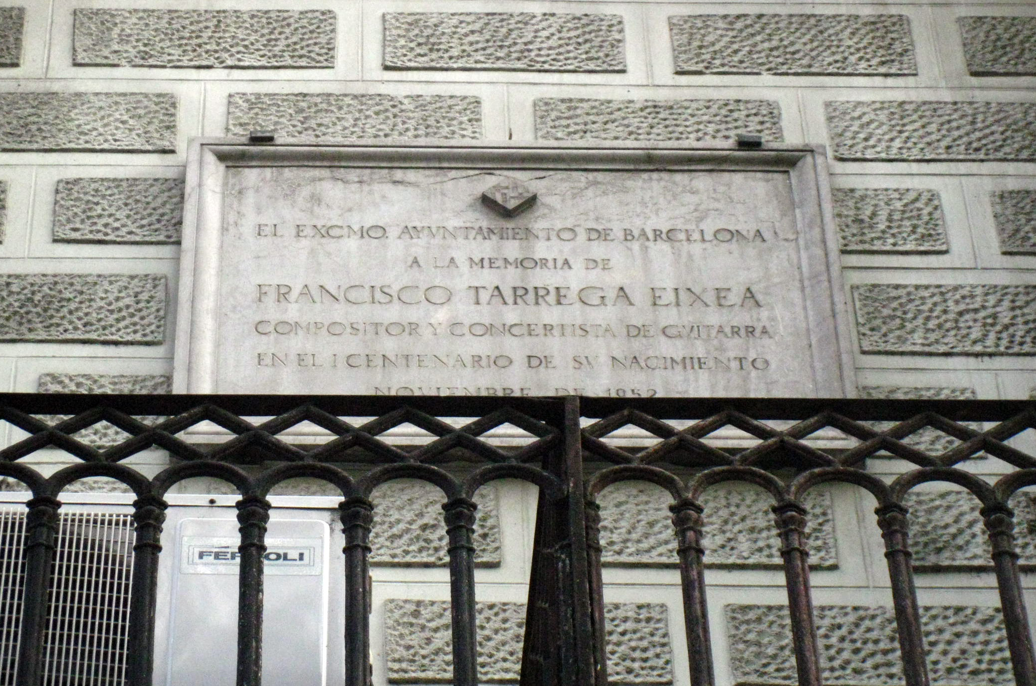 Francesc Tàrrega. C. València, 234 -1er pis- (Barcelona)